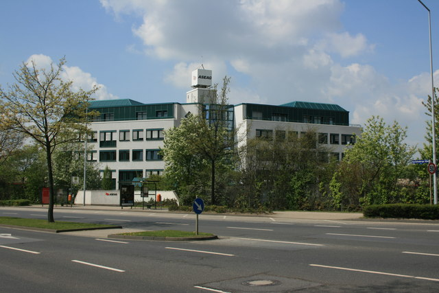 ASEAG Zentrale, 3 km entfernt von Aachen, Deutschland (Zone 32). Hauptgebäude der ASEAG (Aachener Straßenbahn und Energieversorgungs-AG), dem Betreiber des öffentlichen Nahverkehrs in Aachen